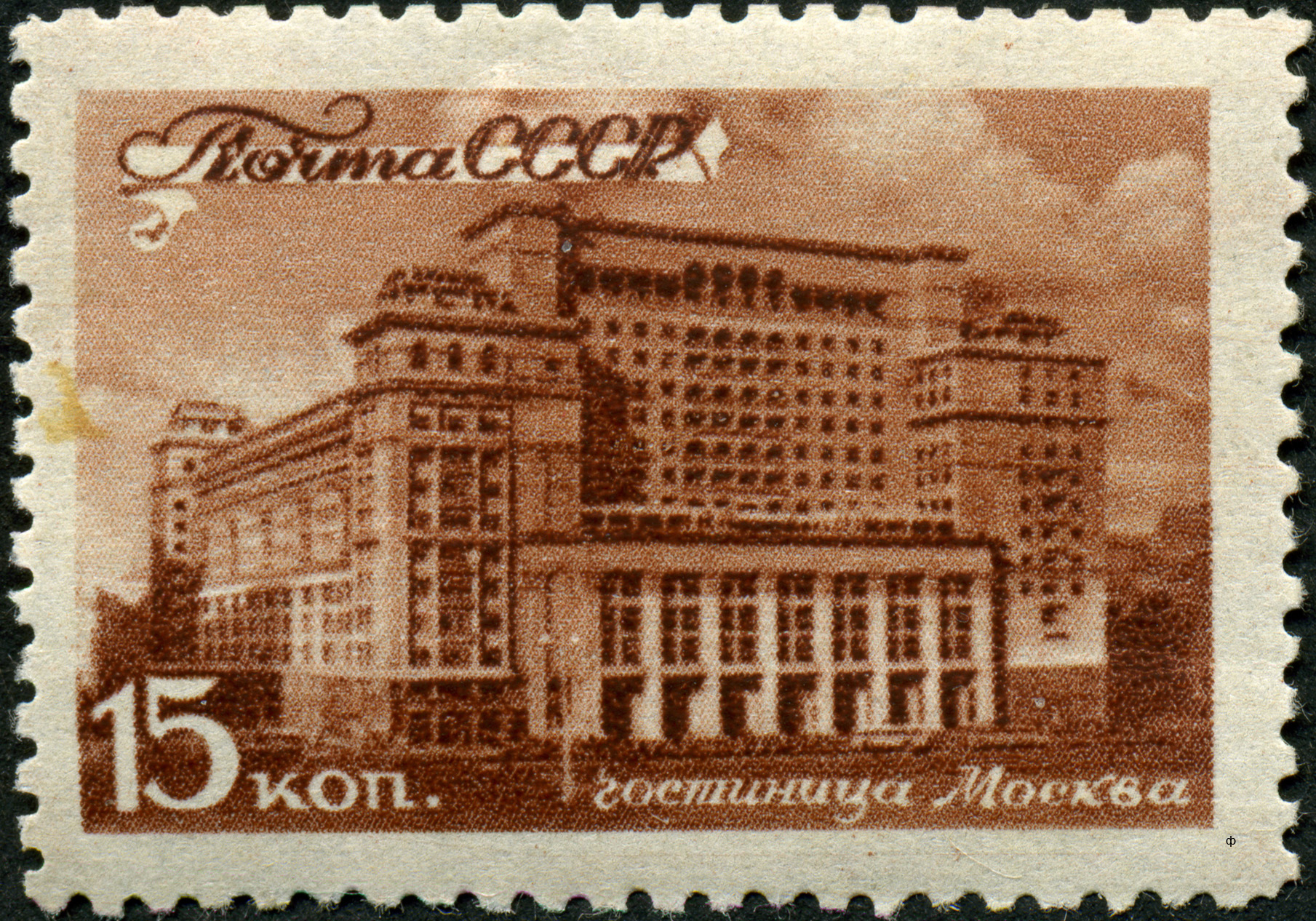 Марка СССР